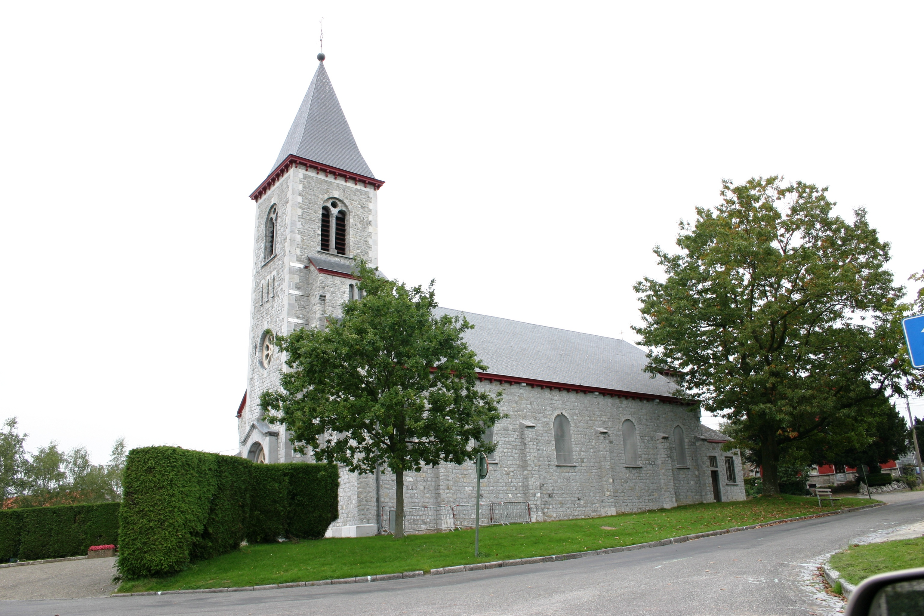 Kierch vu Banneux.